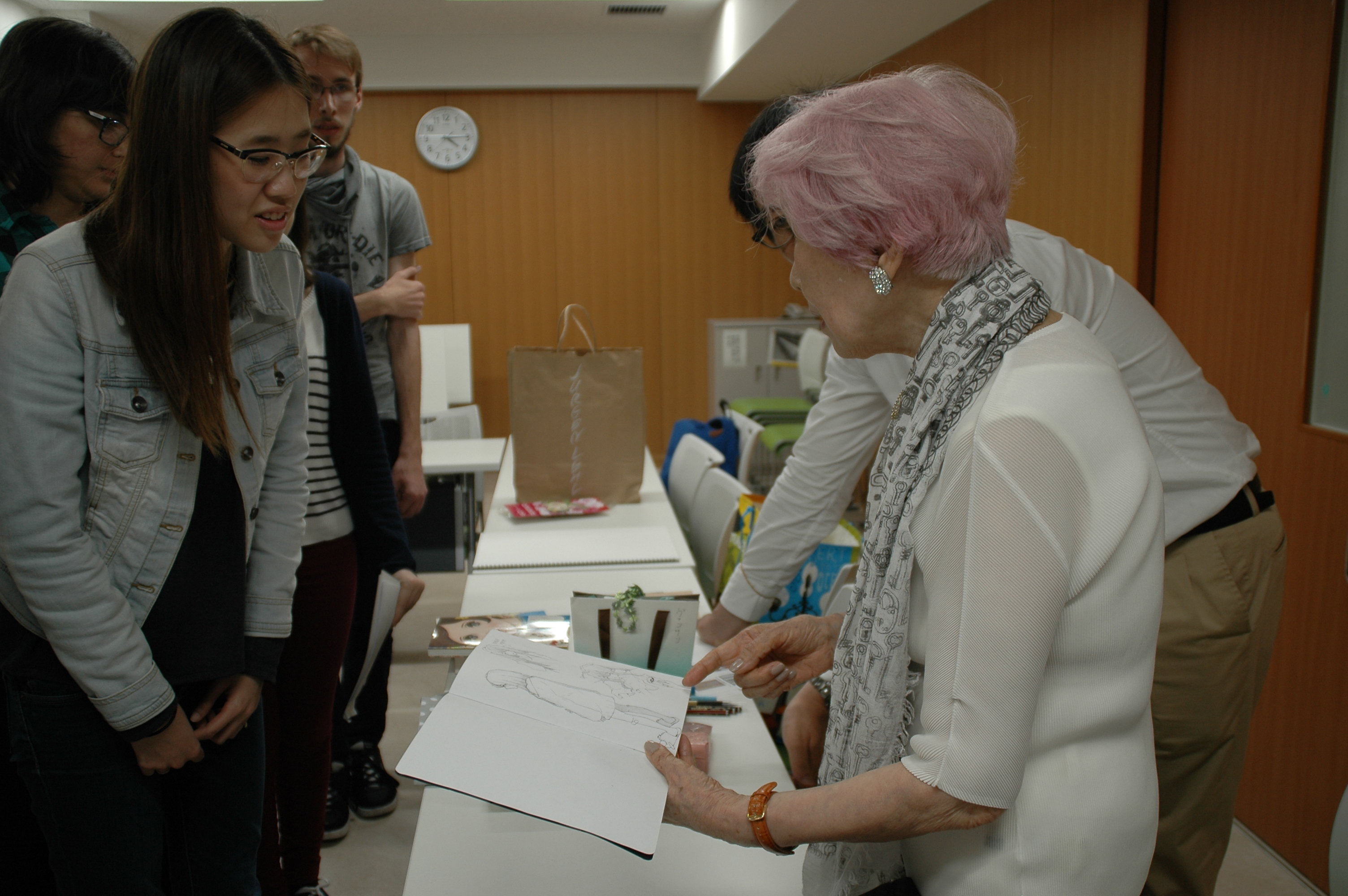 Erico Hanamura, considérée comme l'une des dix plus grandes mangakas vivantes, commente les travaux des étudiants dans le cadre d'une Master class